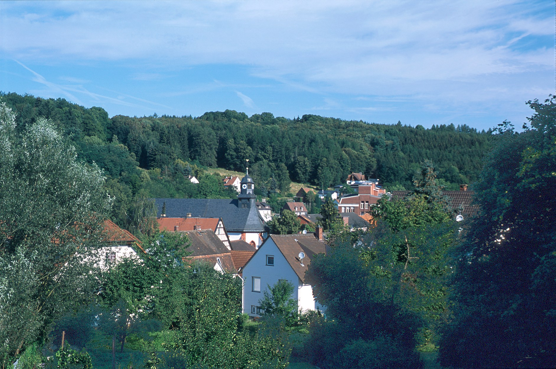 Hirzenhain im Juli 2009. Blick von der Klostermauer.